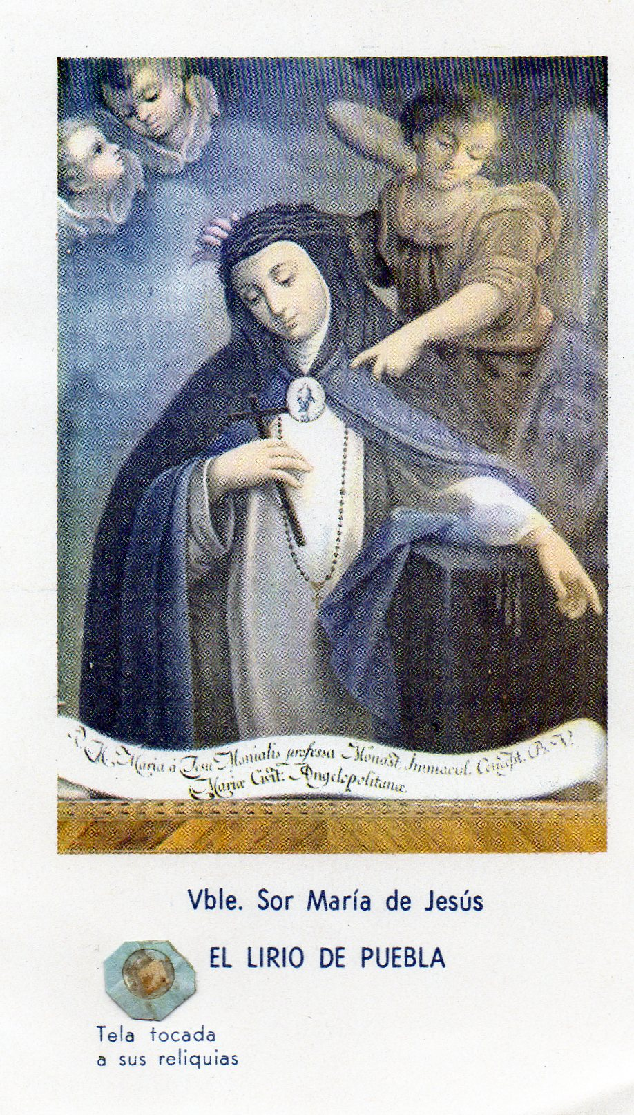 Lirio De Puebla, OIC - Federación Santa Mª de Gpe - Monasterio de la Inmaculada Concepción de la Puebla de los Ángeles